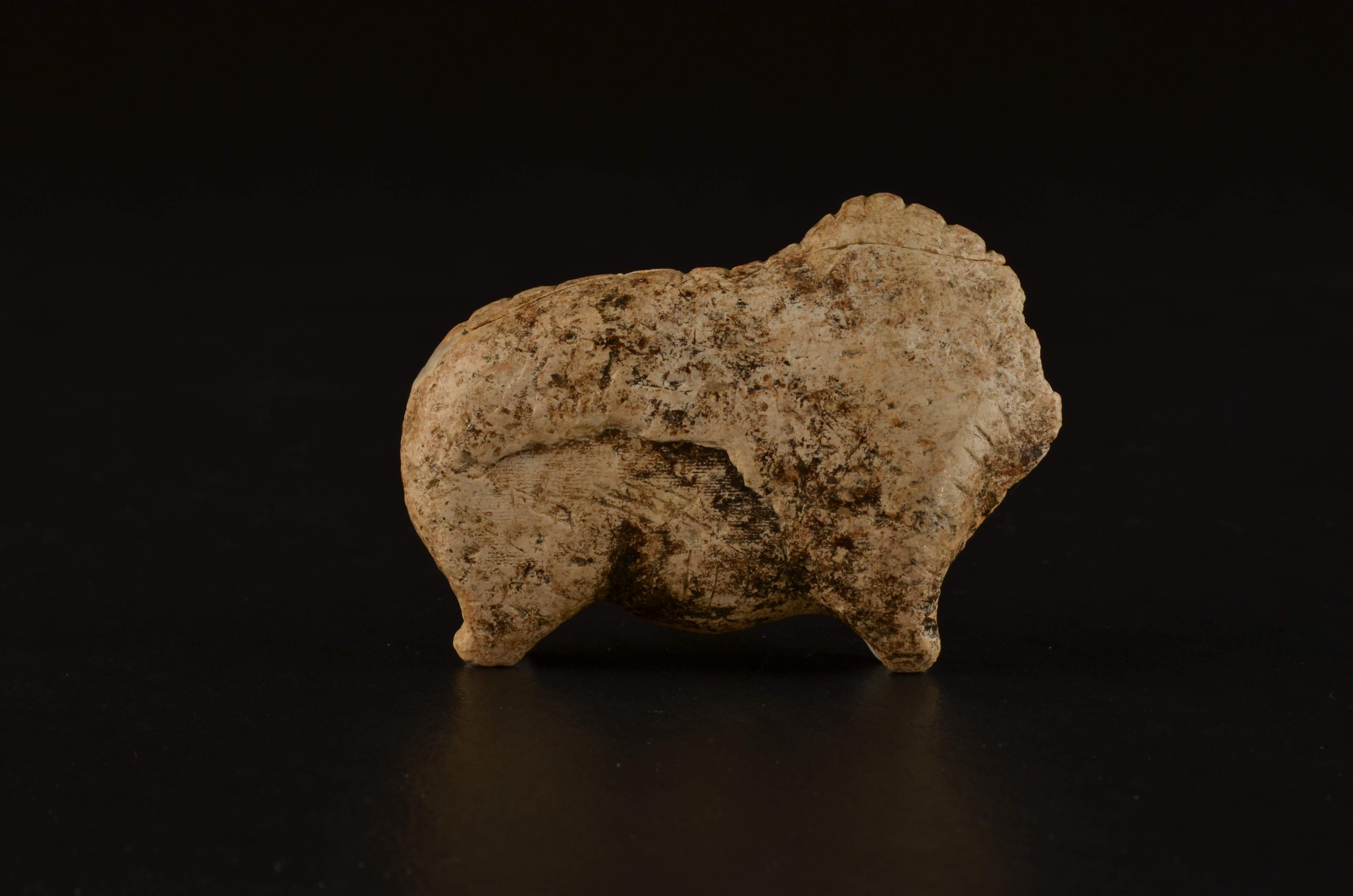 jljljlkejknkölajk muuuuuuuuuu